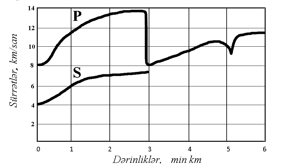 Yer cismində uzununa P və eninə S dalğaların sürrəti.